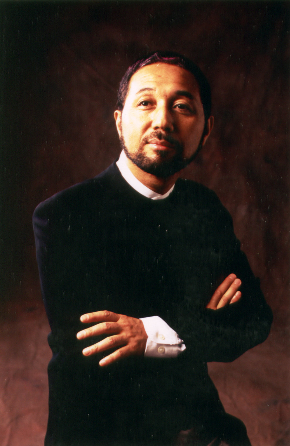 ＣＤアルバム用